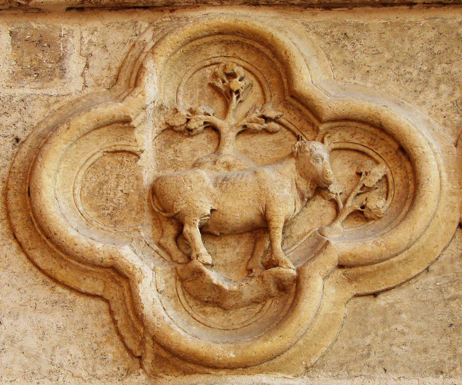 Le taureau (Taurus) ;un des signes du zodiaque complet figurant sur le portail gauche de la façade de la cathédrale d'Amiens.